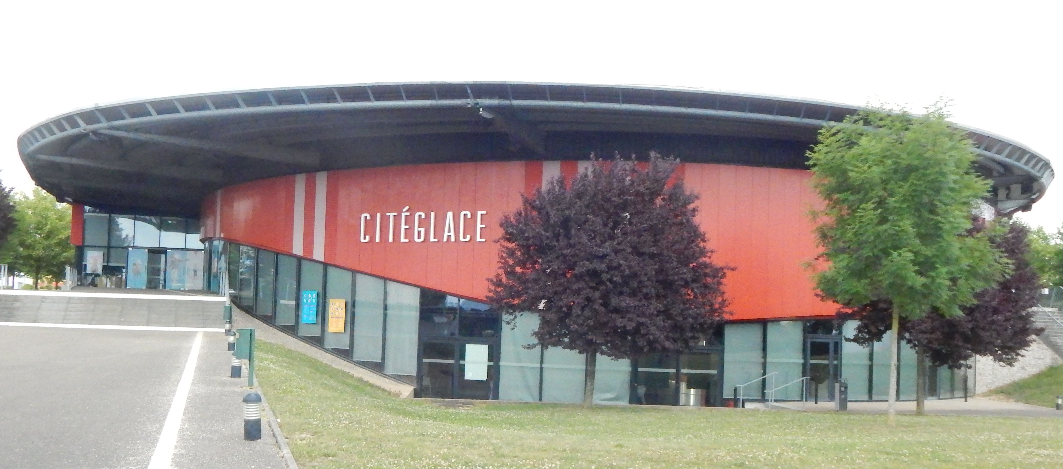 La patinoire de Chalons en champagne